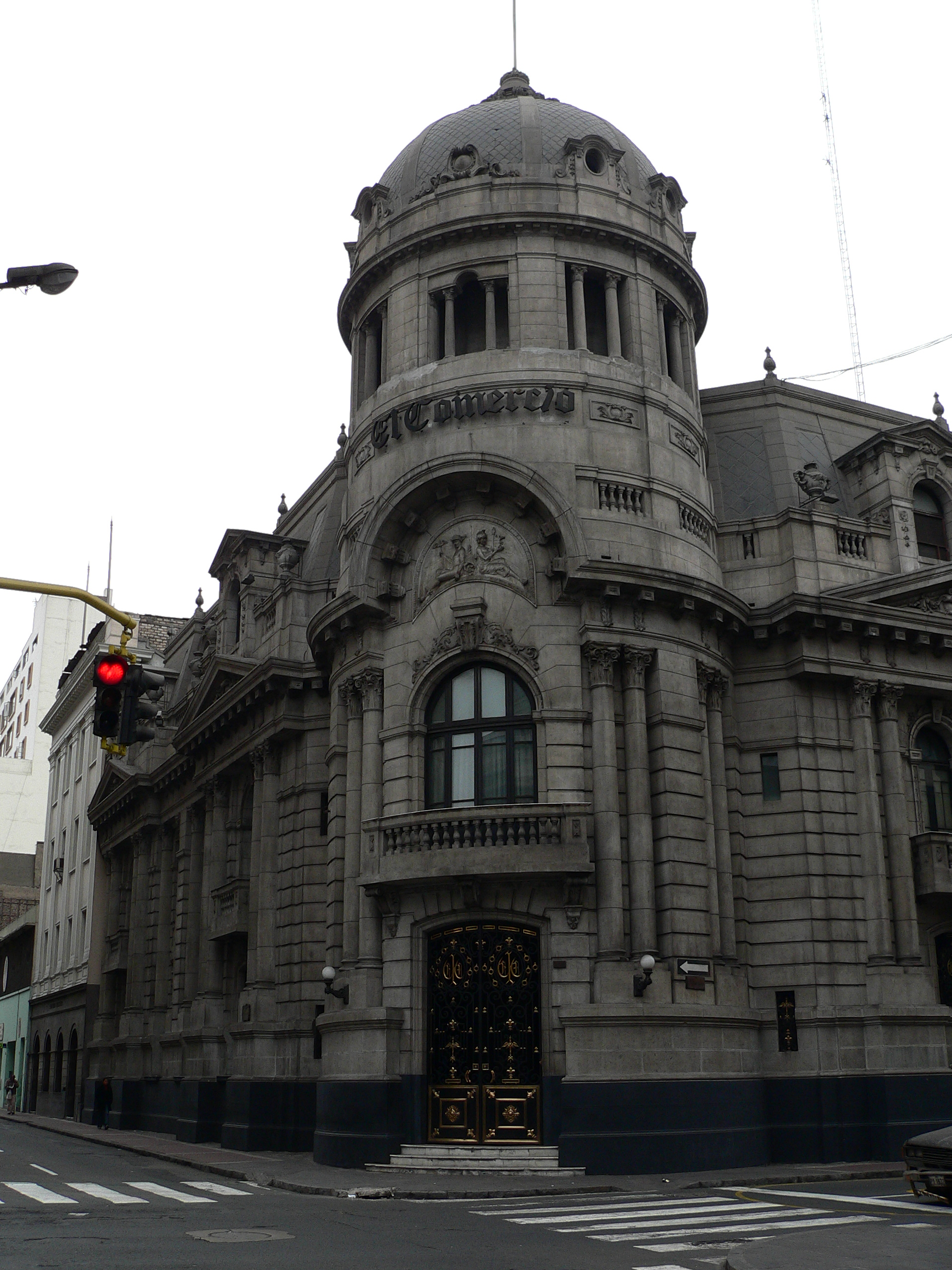 Descripción: Diario “El Comercio” Lugar: Centro Histórico de Lima Distrito : Cercado de Lima Ciudad : Lima País : Perú Fotógrafo: © Manuel González Olaechea y Franco Fecha de la foto : 8 de julio de 2007